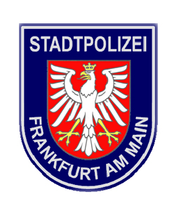 Wappen der Stadtpolizei Frankfurt am Main, © Stadt Frankfurt am Main